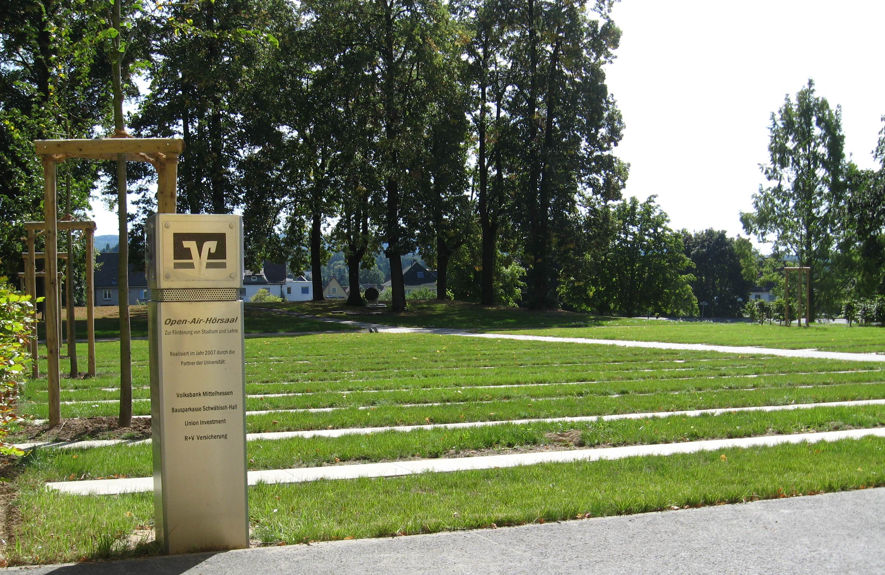 Der Open-Air-Hörsaal am Fachbereich für Wirtschaft und Jura der Justus-Liebig-Universität Gießen